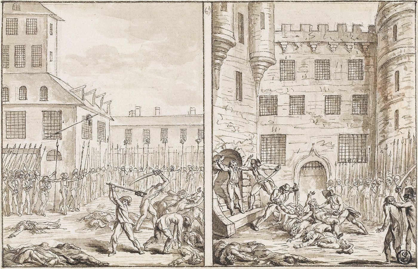 Massacre à l'abbaye deSaint-Germain-des-Prés, 2 septembre 1792.